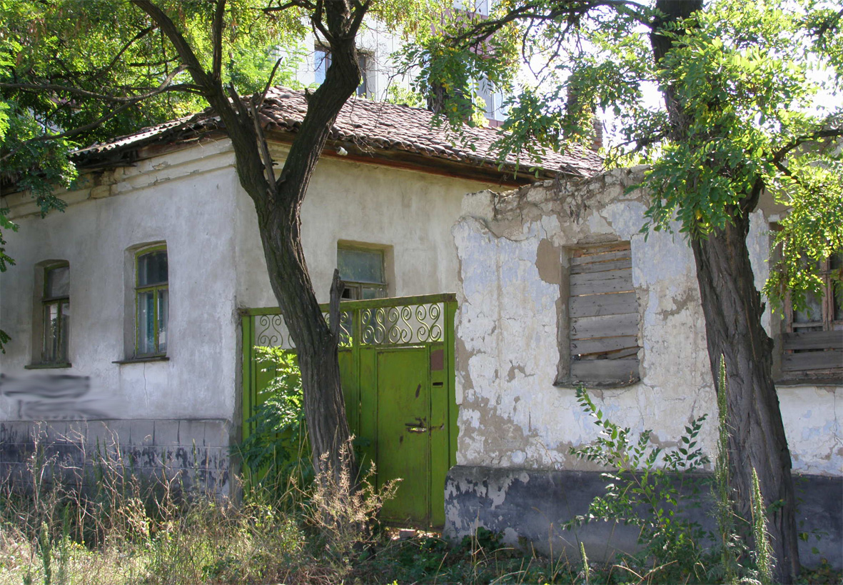 Старий будинок біля мерії, Вулиця Коцюбинського (Луганськ)